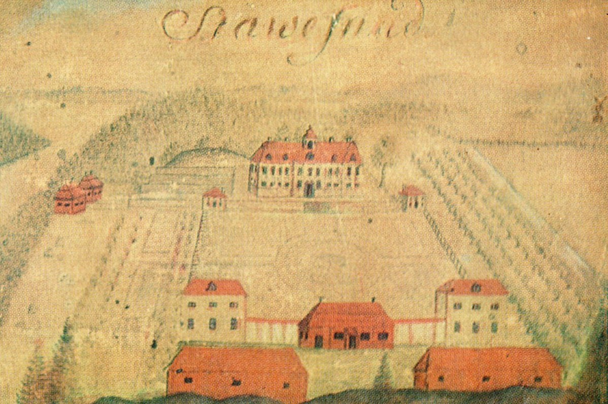 Detalj från Gripenhielms Mälarkarta, Stavsund